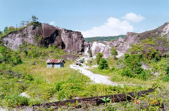 แหล่งแร่หาดส้มแป้น